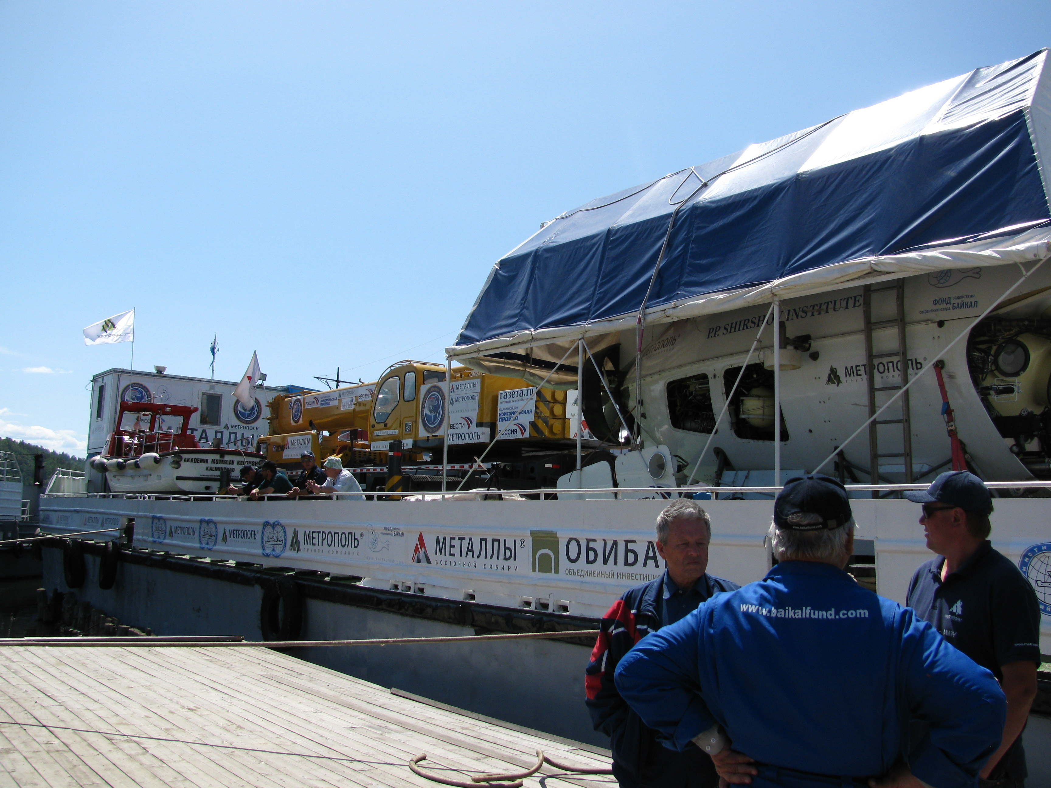 Грузовая баржа в порту села Турка на озере Байкал, с глубоководными обитаемыми аппаратами МИР-1 и МИР-2 на борту. В задней части судна расположен стотонный автокран.